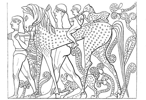 Dessin des fresques Tombe Campana Véies